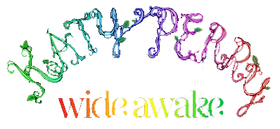 Foto para el artículo en español de Wide Awake.